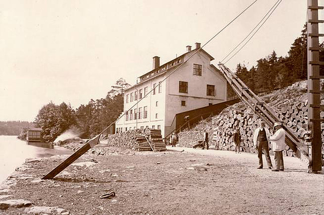 "Vita huset" vid Alviks Strand, Gustavslundsvägen 147, Alvik, Bromma, Stockholm, 1895-1900. Byggnaden var från början mjölksyrafabrik, sedan Barnängens Tekniska Fabriks huvudkontor, sedan Alfa-Lavals huvudkontor. Idag har andra företag sina kontor där.